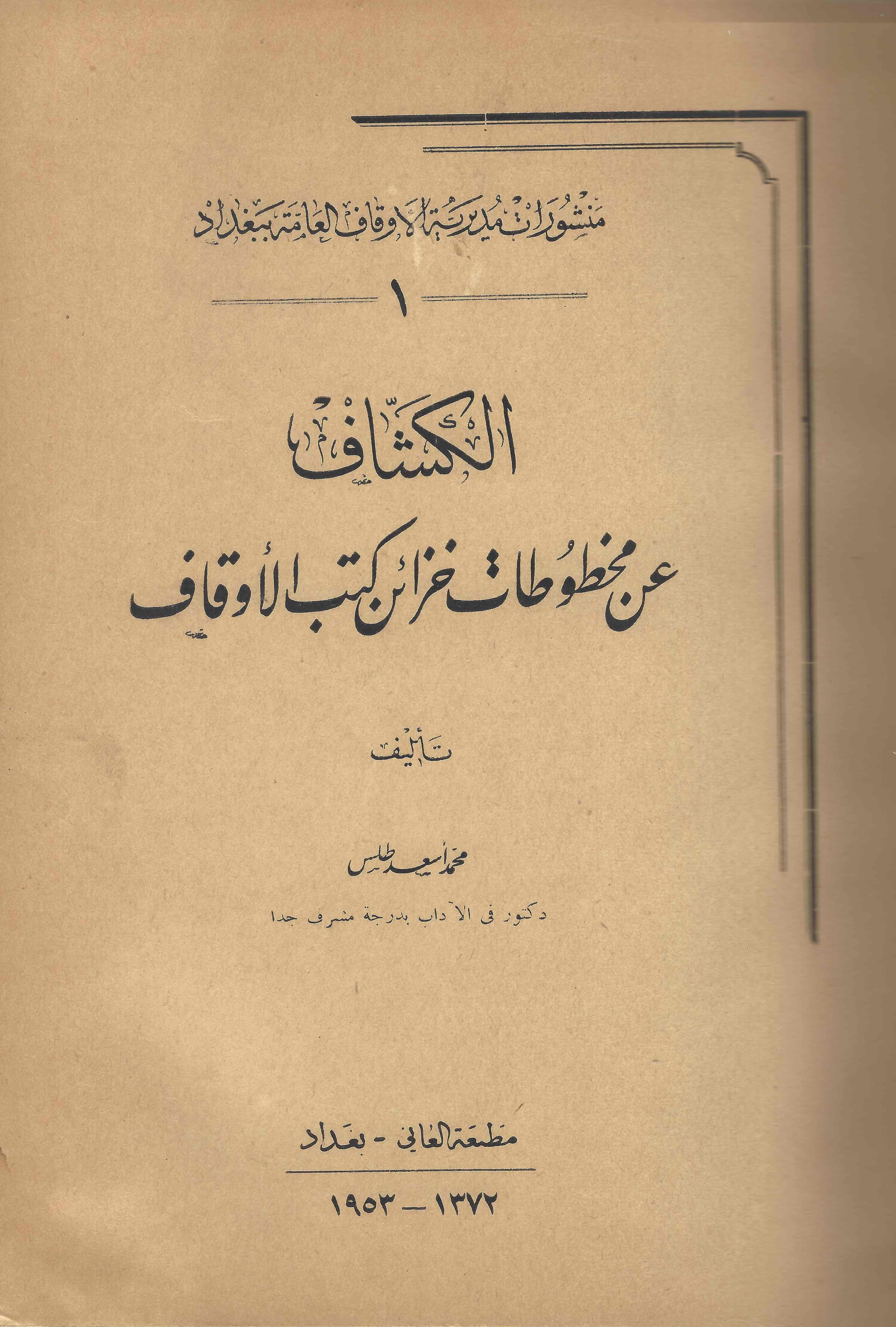 غلاف كتاب (الكشّاف عن مخطوطات خزائن كتب الأوقاف) - د. محمد أسعد طلس - مديرية الأوقاف العامة - بغداد 1953.